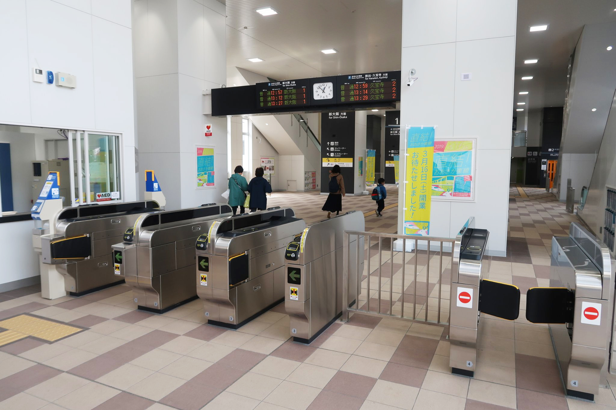 MinamiSuita_Kaisatsu